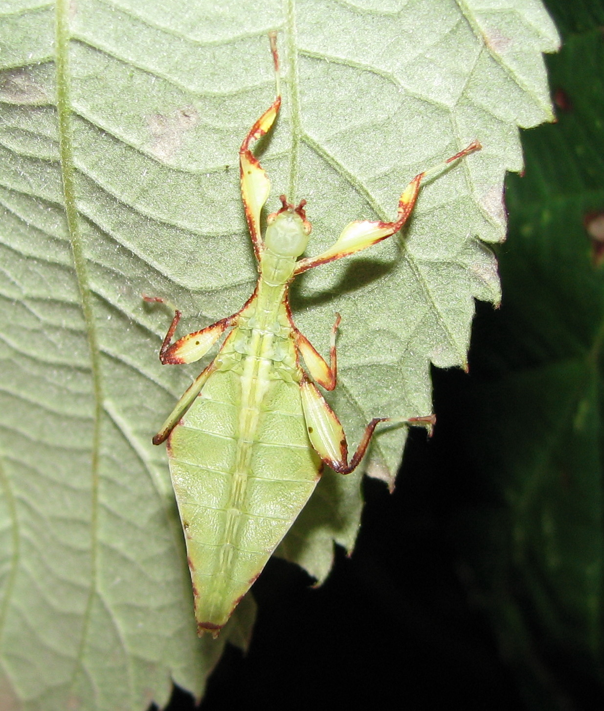 Phyllium bilobatum, male larva